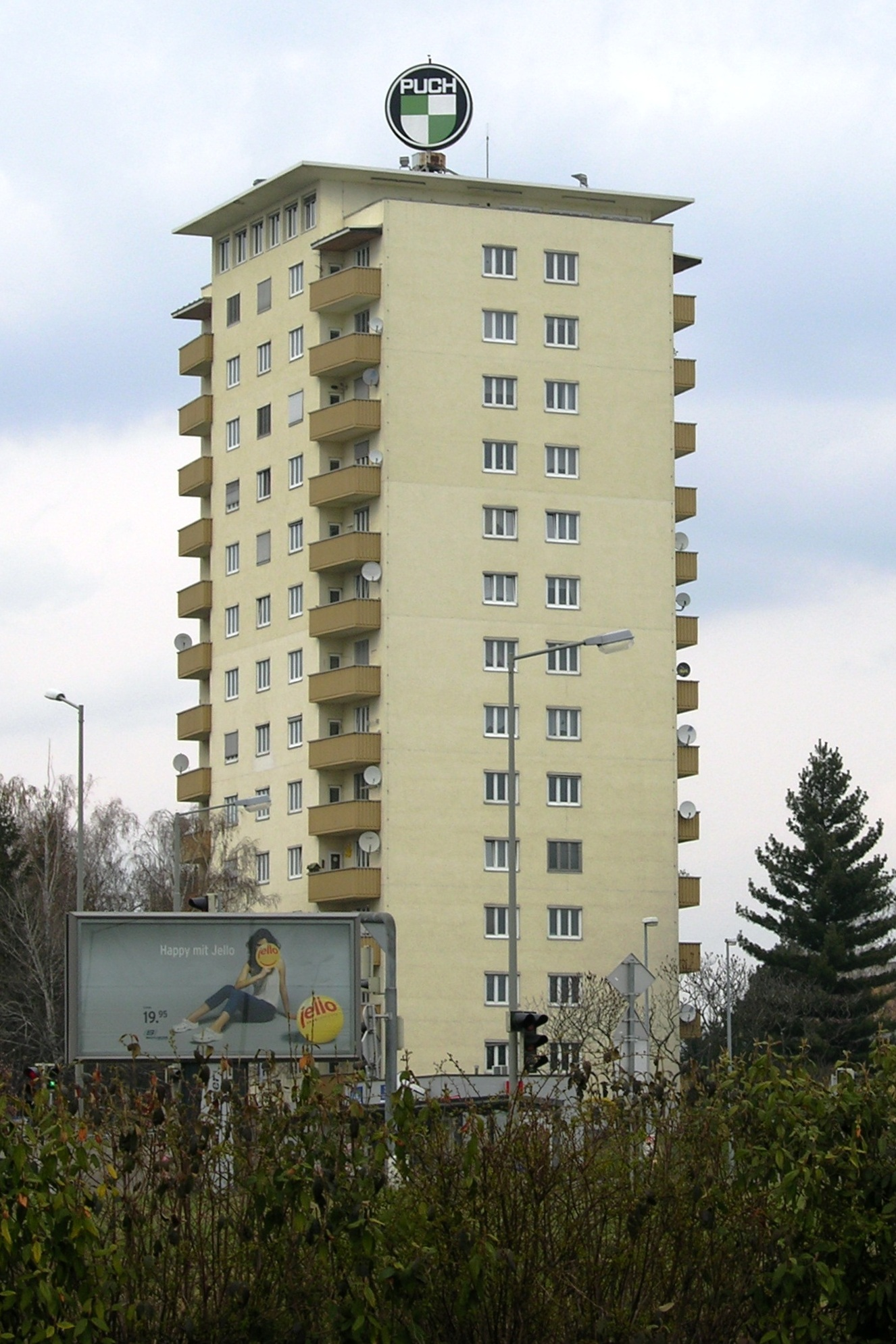 Puch-Hochhaus in Graz, Liebenau, Liebenauer Hauptstr. 309